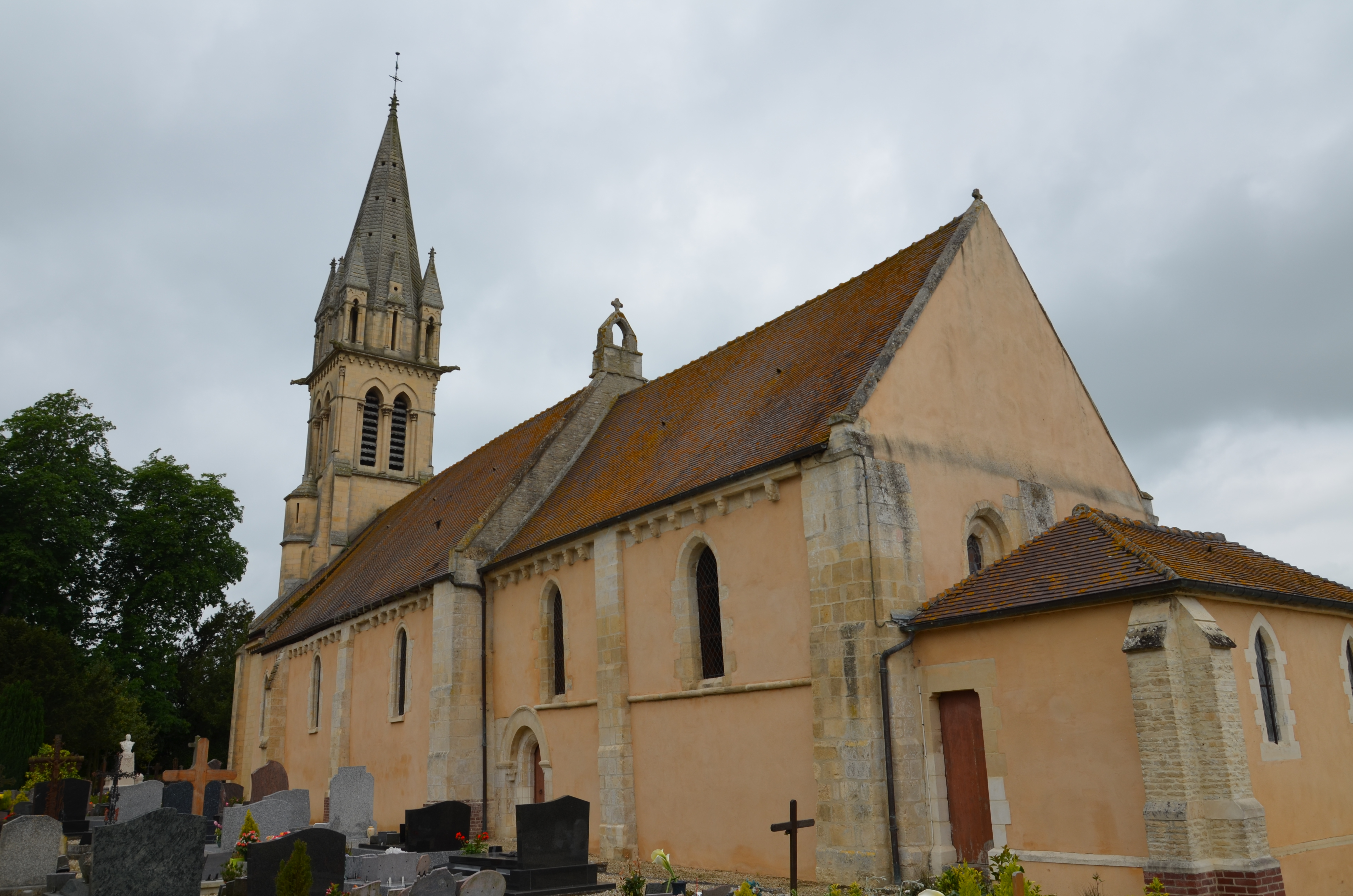 Église Saint-Germain de Magny-le-Freule.